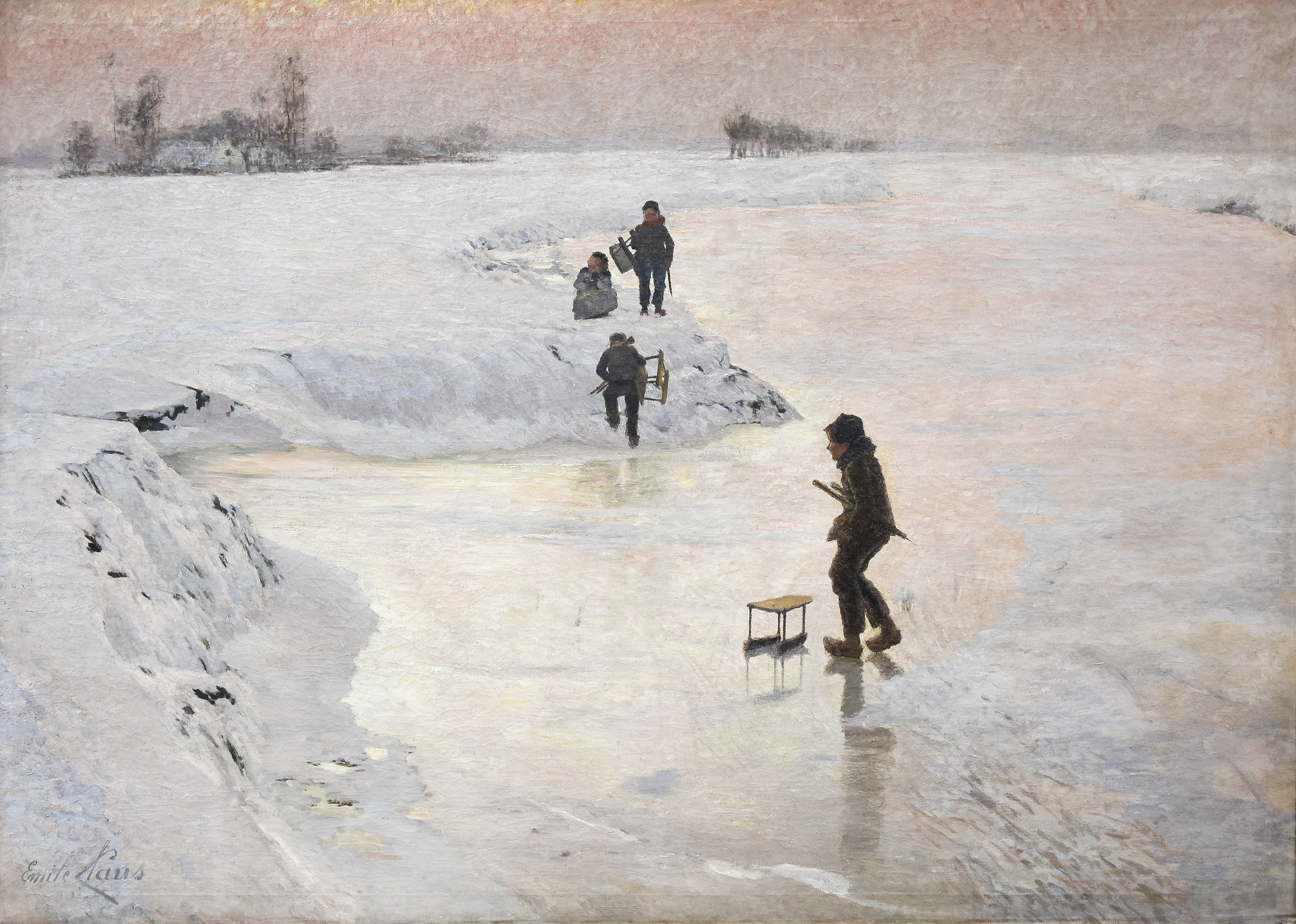 De ijsvogelstitle QS:P1476,nl:"De ijsvogels" label QS:Lnl,"De ijsvogels" label QS:Lde,"Eisvögel"